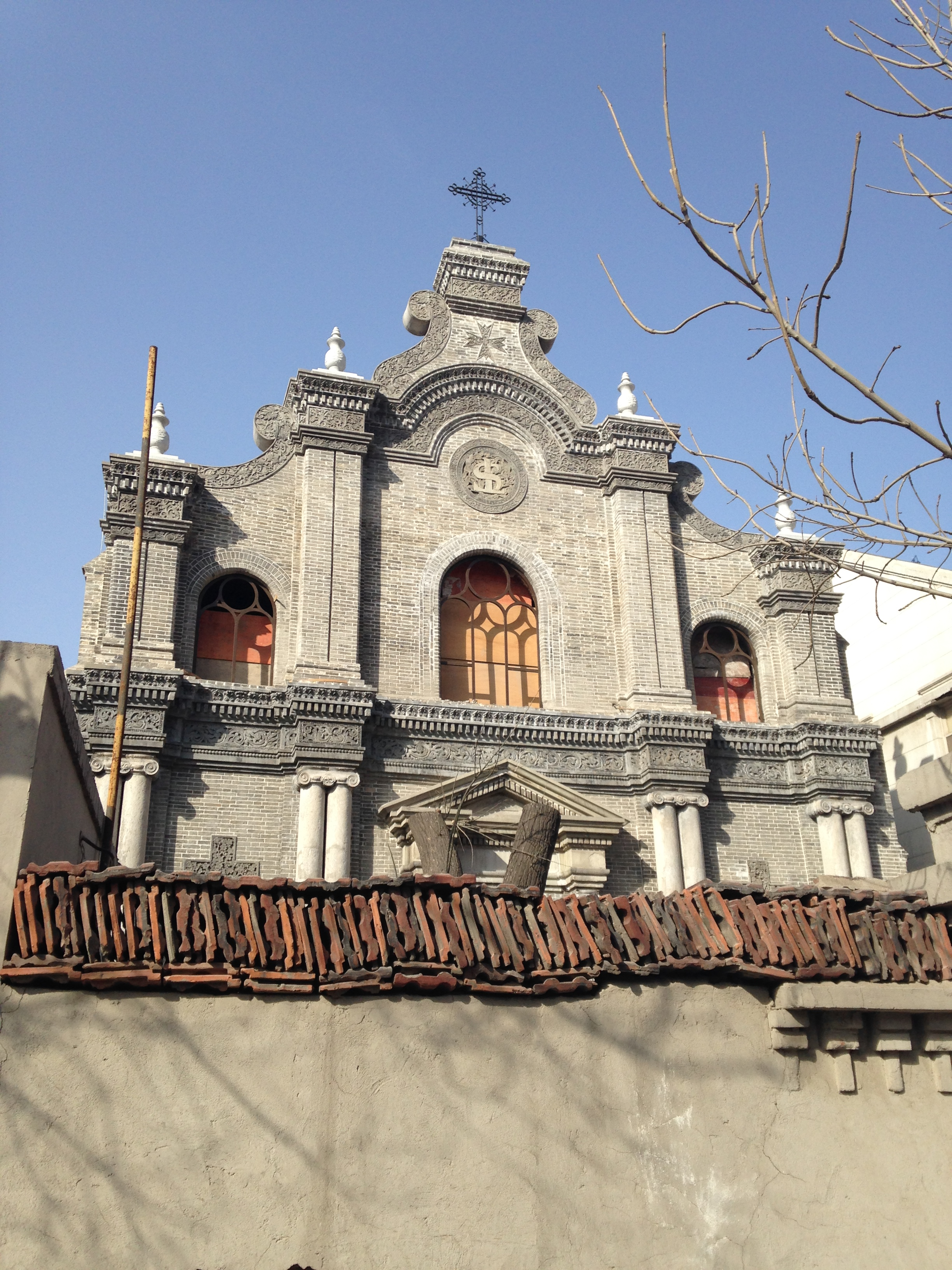 紫竹林教堂